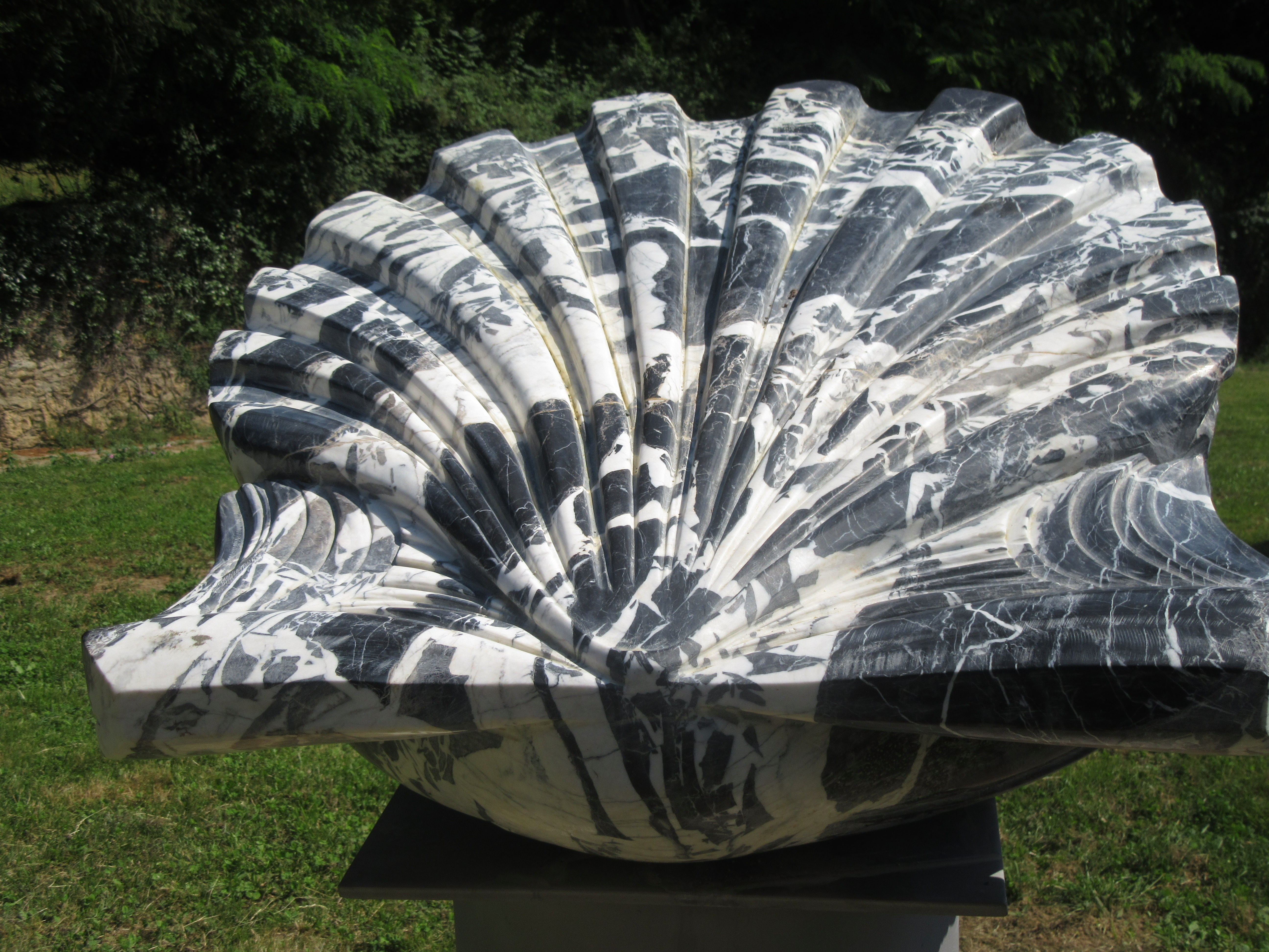 Moulis (Ariège) - coquille St-Jacques en marbre d'Aubert